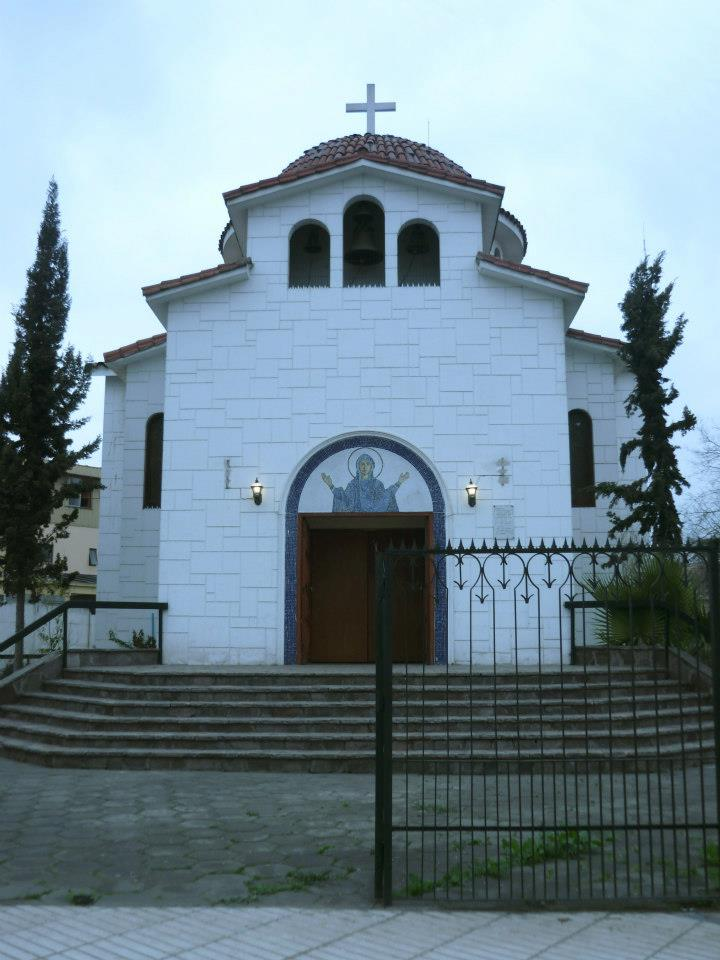 Fachada Principal de la Iglesia Ortodoxa Griega